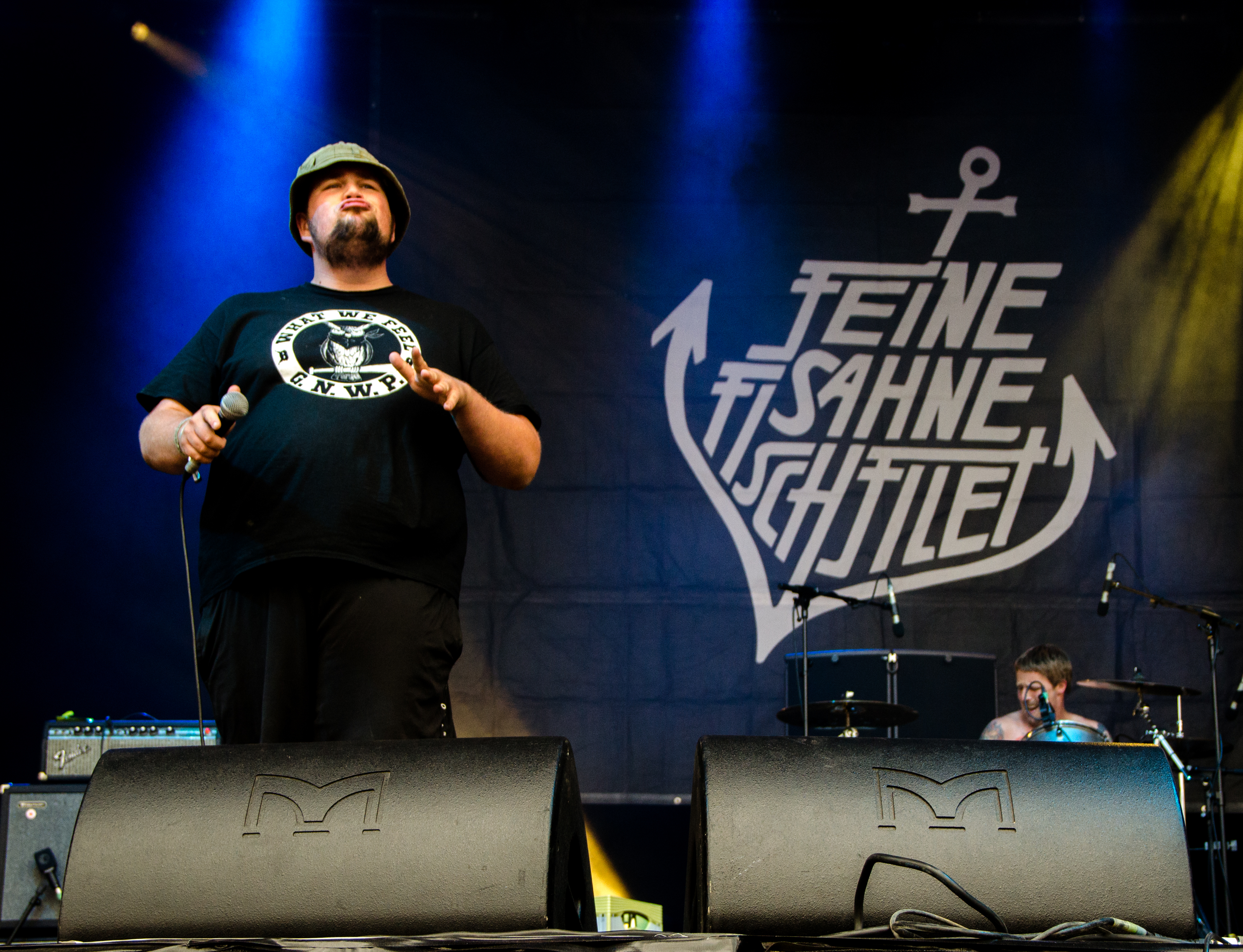 Sänger Jan "Monchi" Gorkow, der Band Feine Sahne Fischfilet auf dem Kosmonaut Festival 2014 in Chemnitz Oberrabenstein.